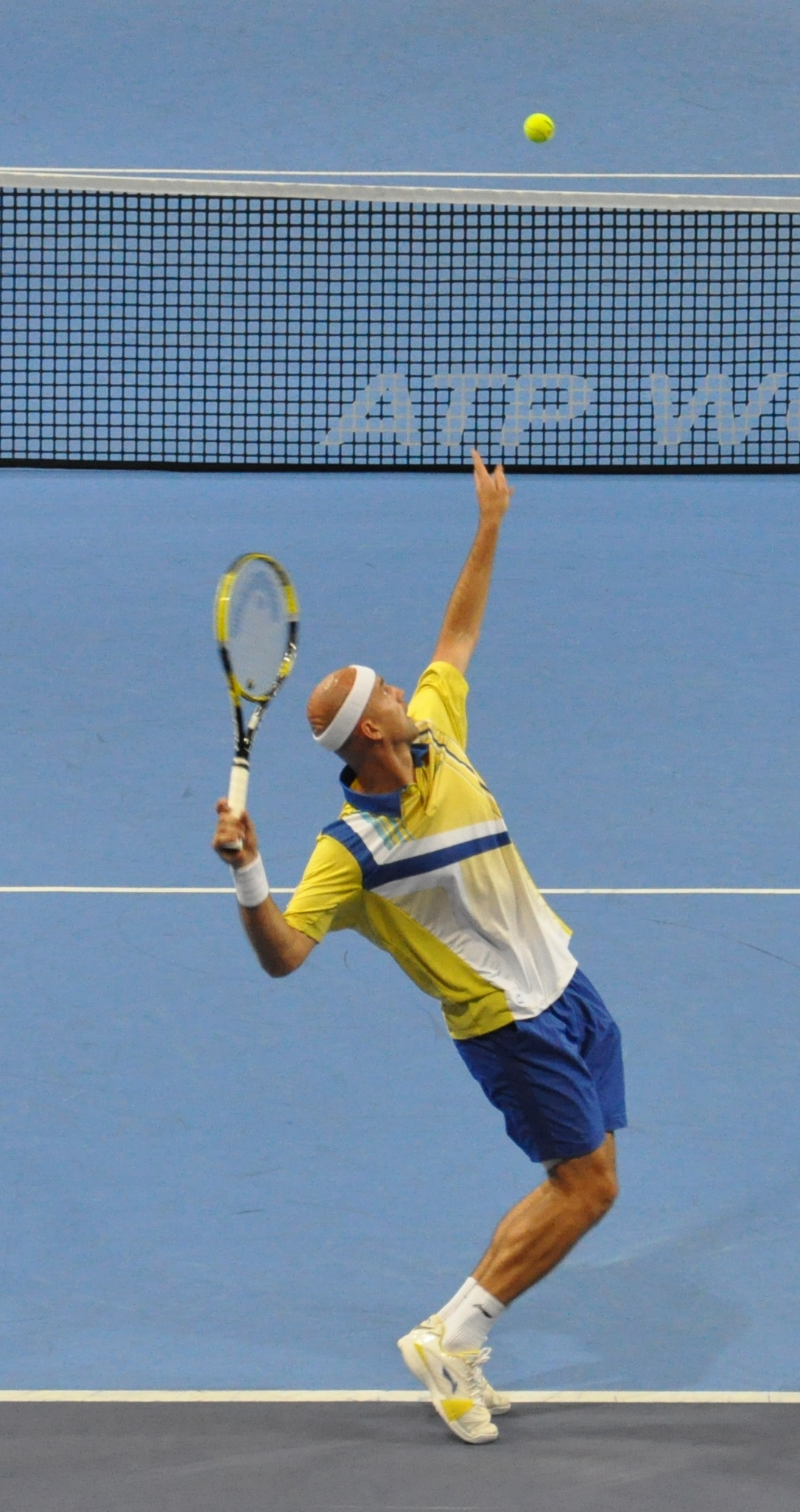 Le joueur de tennis Ivan Ljubicic au service lors des 1/2 finales de l'Open de Moselle 2011